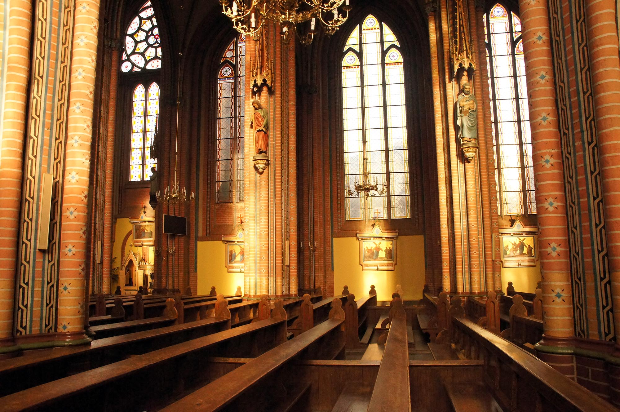 Bielawa, kościół par. p.w. Wniebowzięcia NMP, 2 poł. XIX